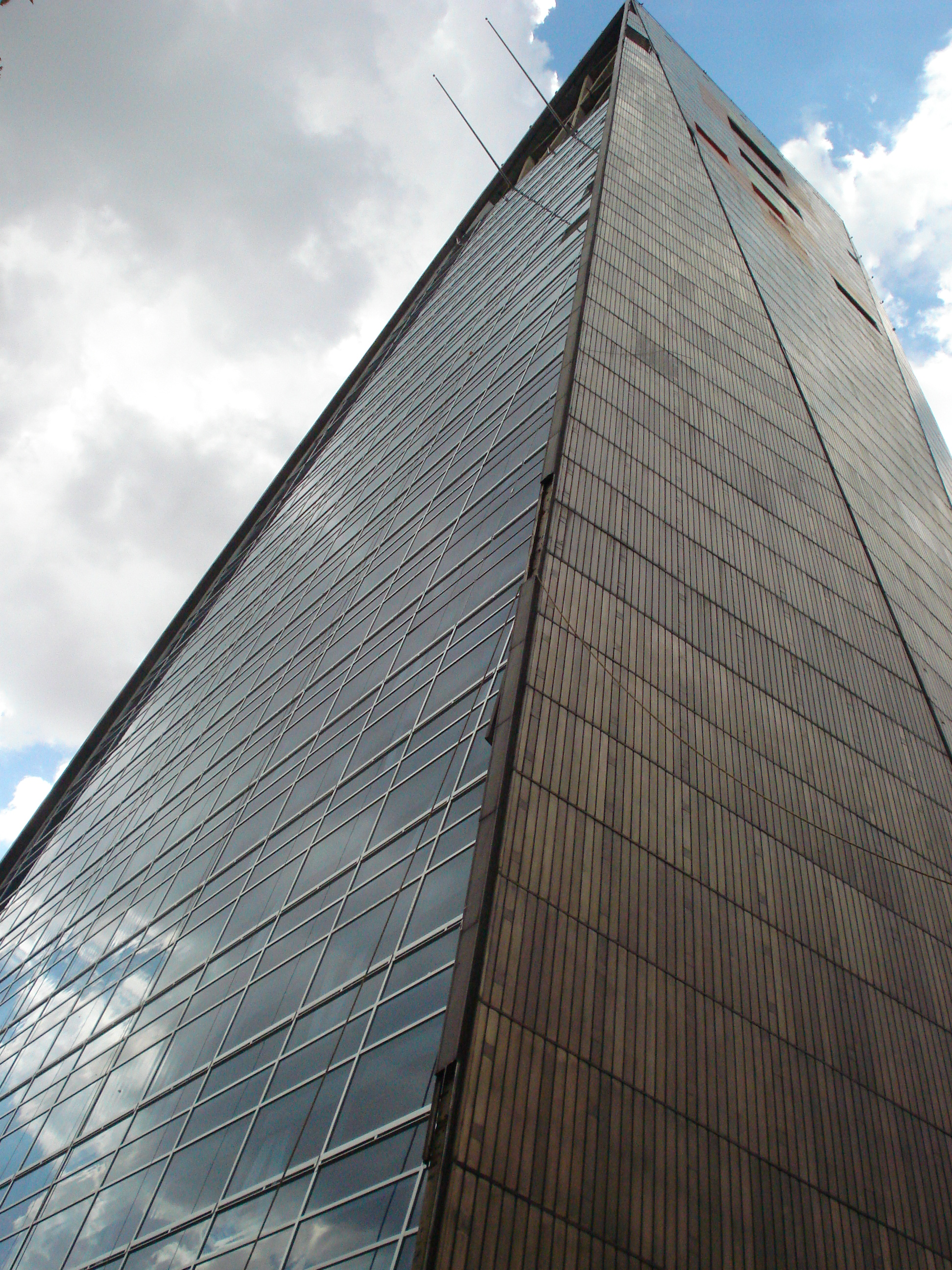 Torre Insignia de Ciudad de México.